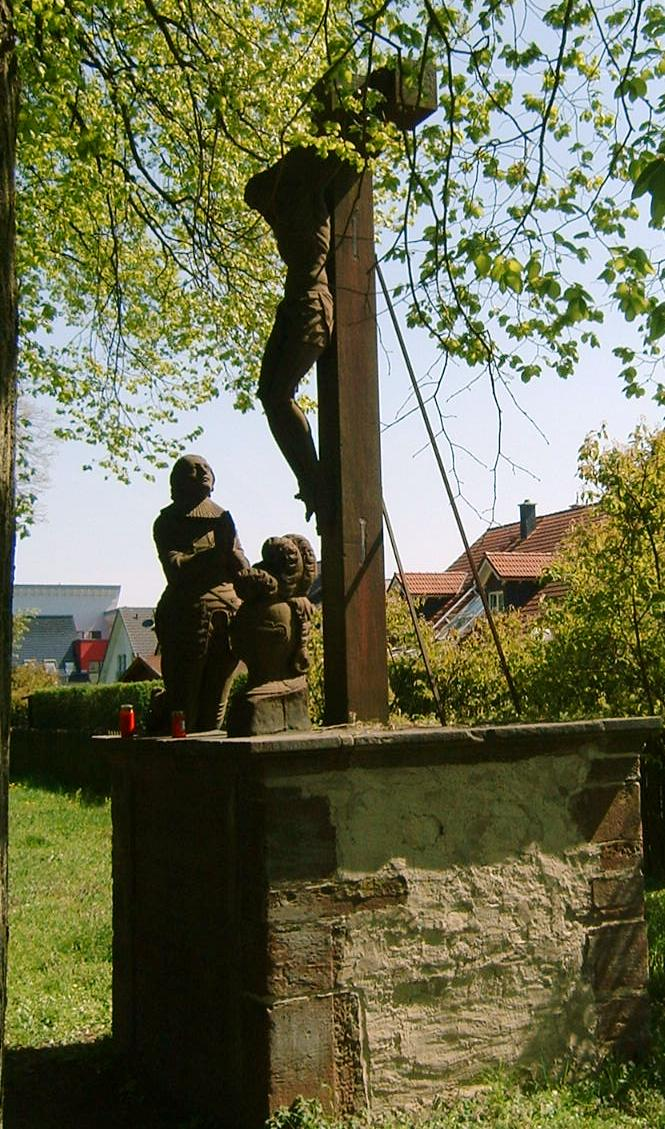 Denkmal für den Ritter Walter von Kerpen (+ 1627) in der Schönbuschallee in Aschaffenburg